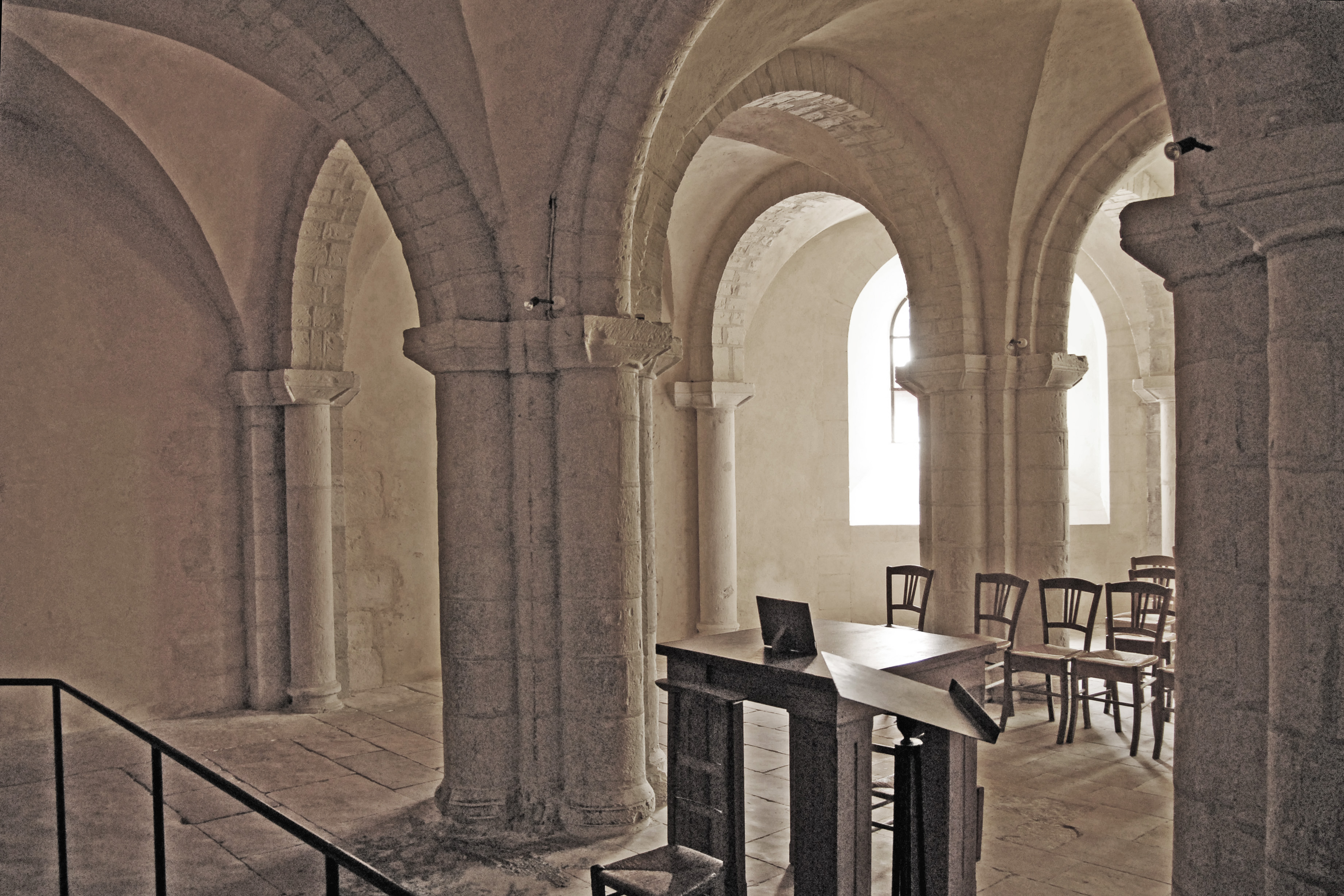 Nevers, Kathedrale, Krypta